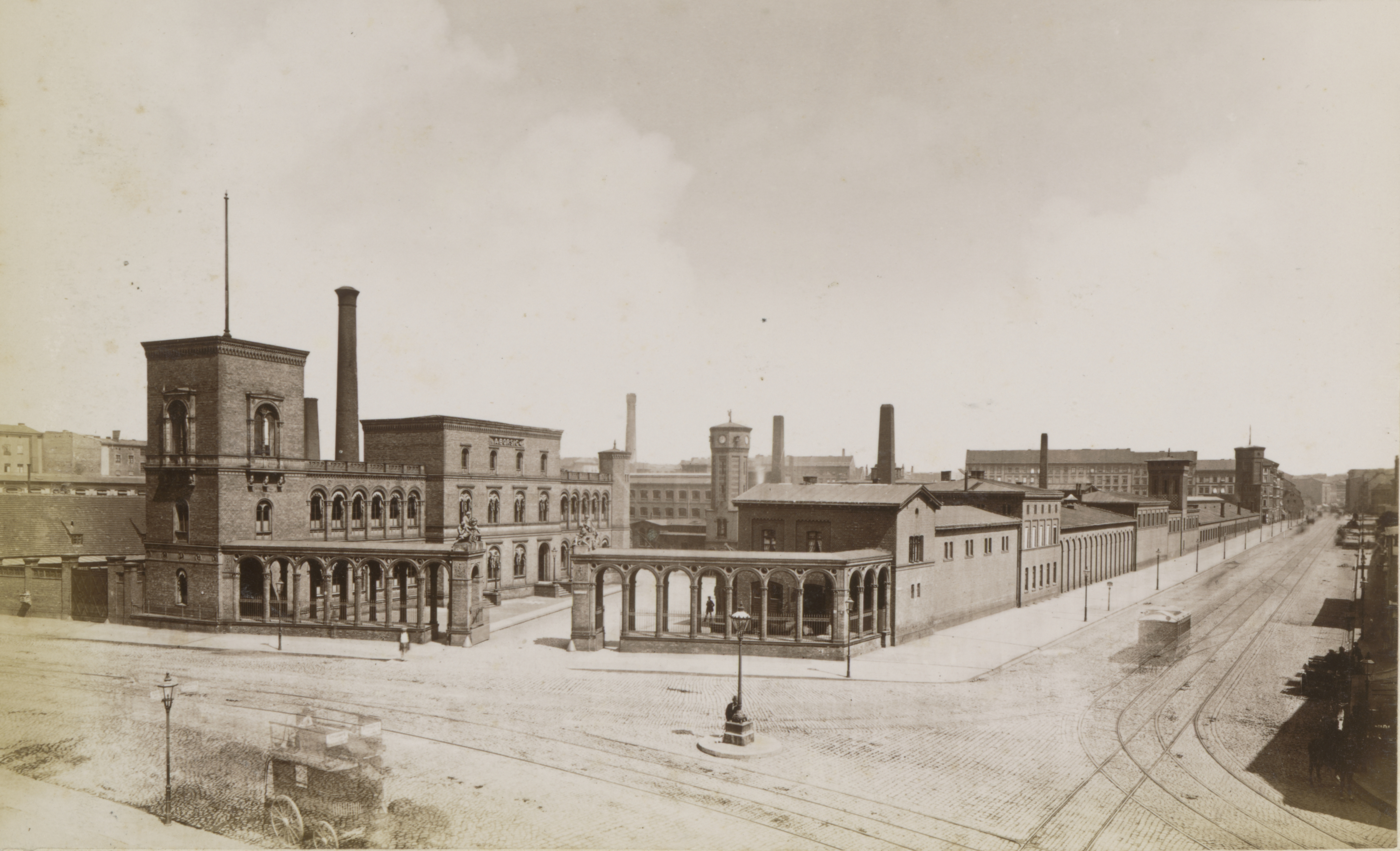 Berlin - Borsigs Maschinenbauanstalt an der Chausseestraße beim Oranienburger Tor, 1875